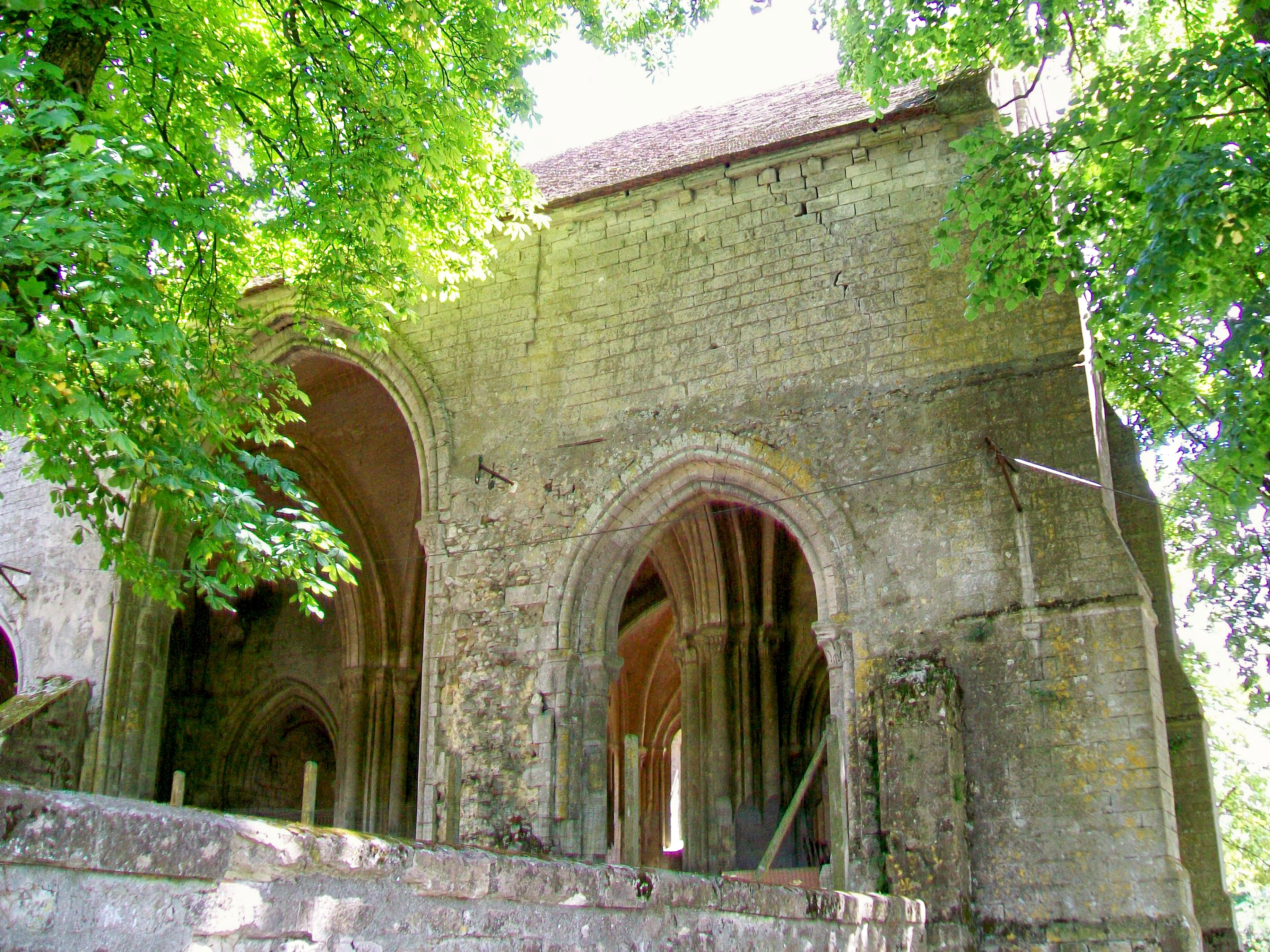 La chapelle ruinée du prieuré Saint-Christophe - vue depuis le sud-ouest dans le chœur et le transept. La nef manque.